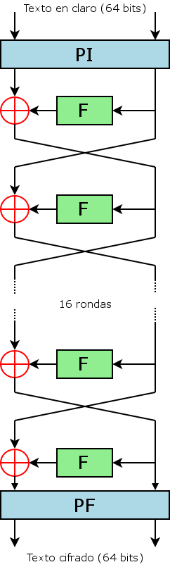 DES - Estructura básica Modificada de es::en:Image:DES-main-network.png